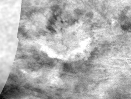 ホテイ弧状の地形